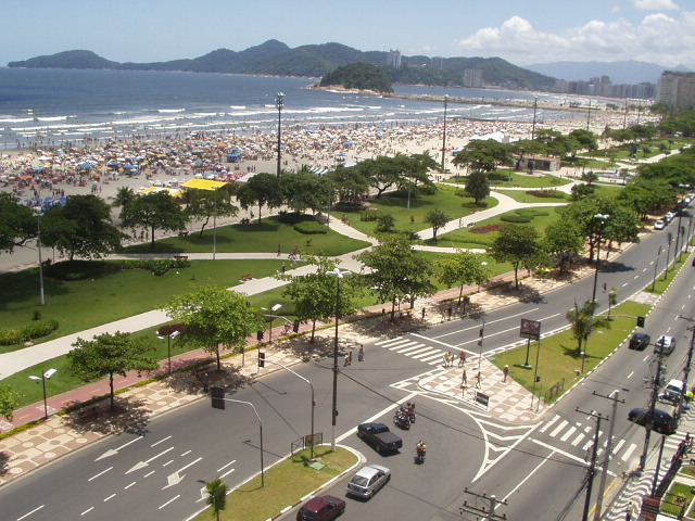 Santos.